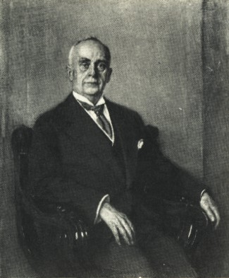 Bildnis Minister Hedrich (Finance Minister Hans Hedrich (1866-1945)